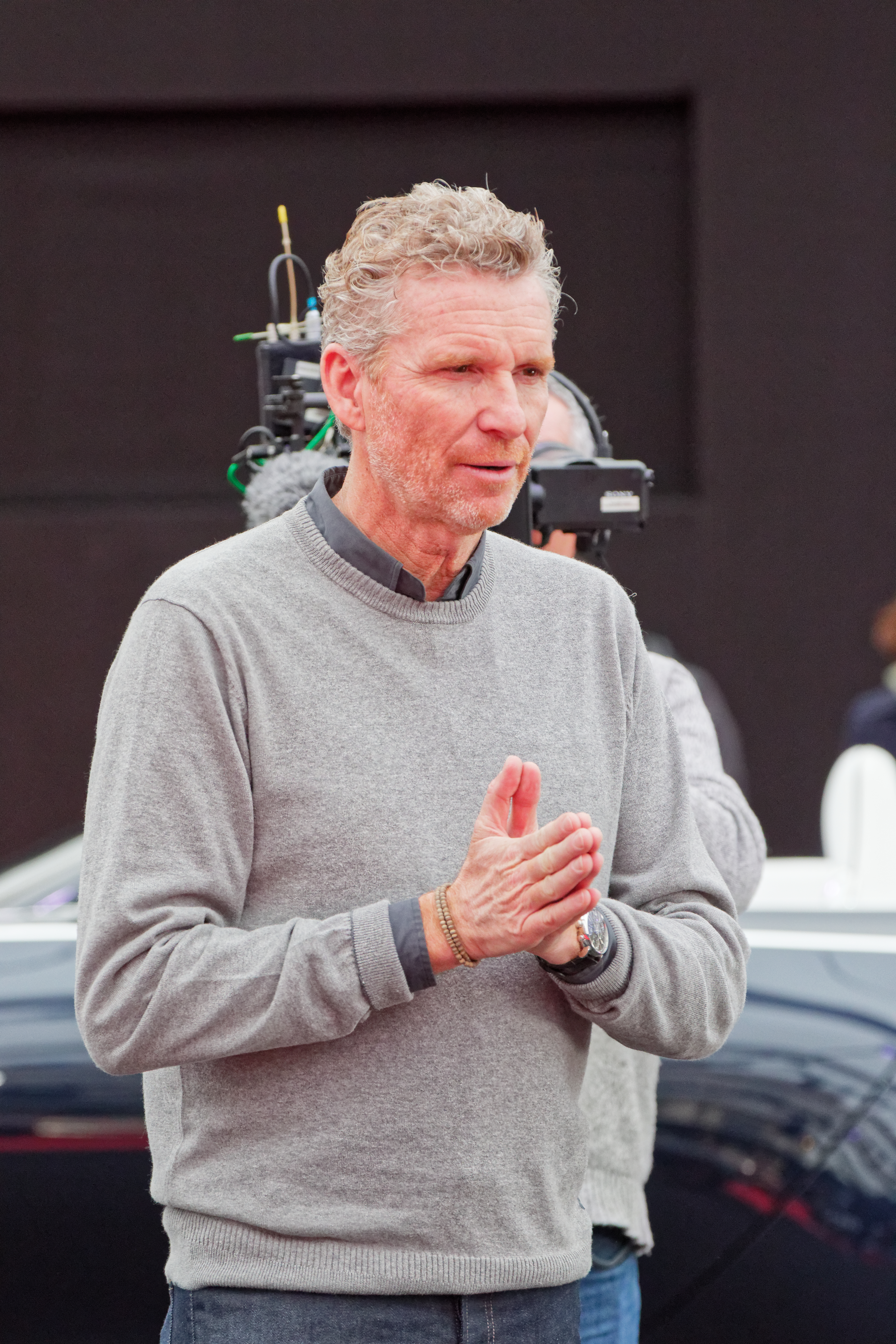 Denis Brogniart enregistrant une séquence de l'émission Automoto lors du festival automobile international 2018.